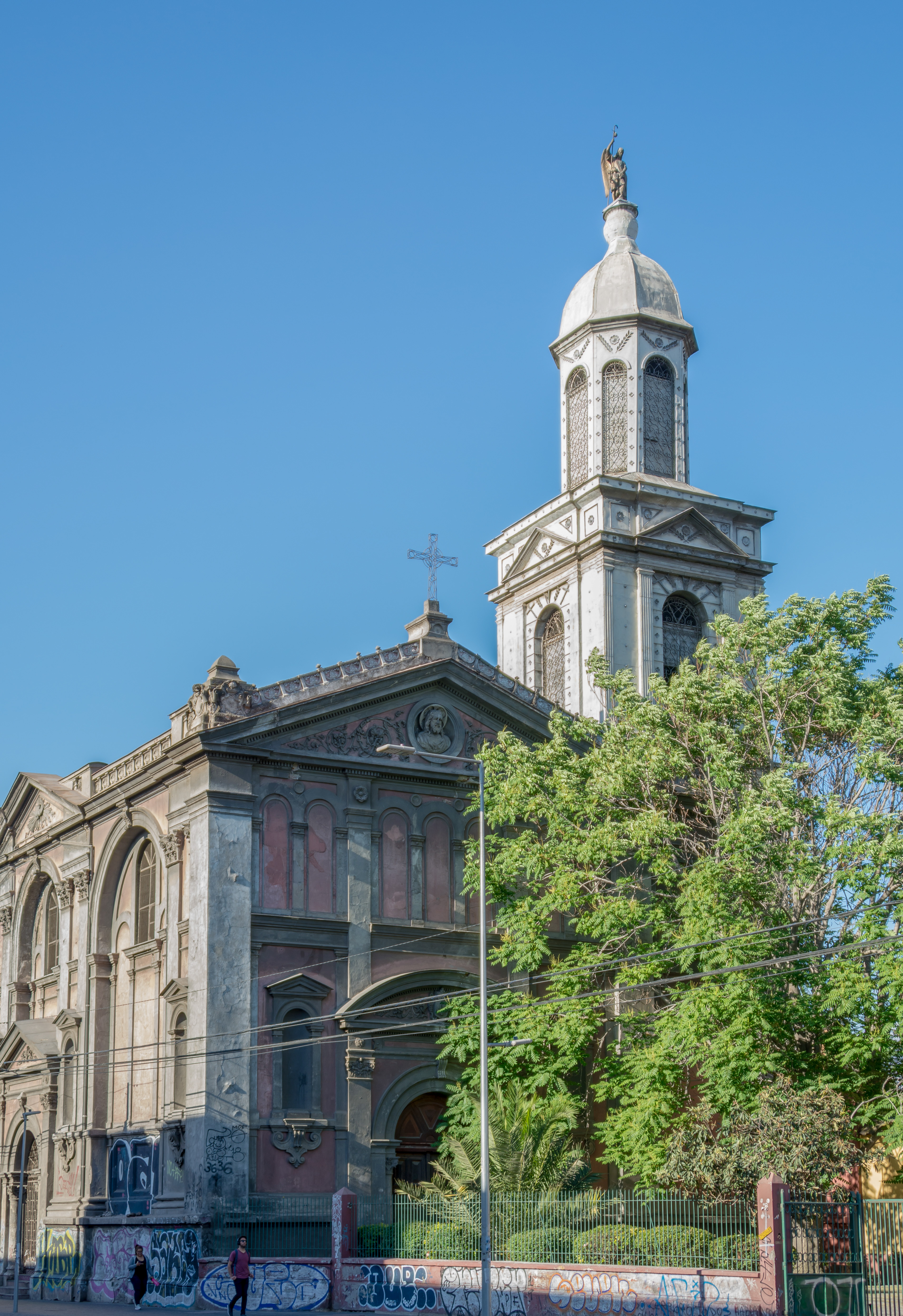 Iglesia del Monasterio del Carmen Bajo de San Rafael, Santiago, Región Metropolitana de Santiago, Chile